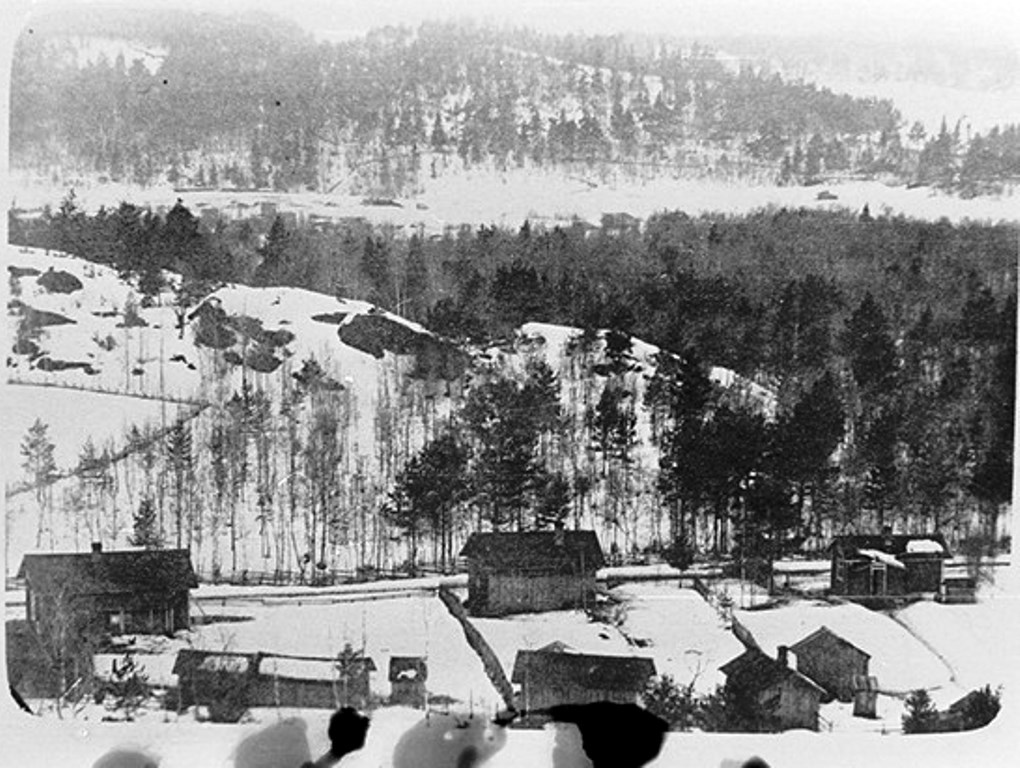 Haukkavaara, 1920-30-е гг.